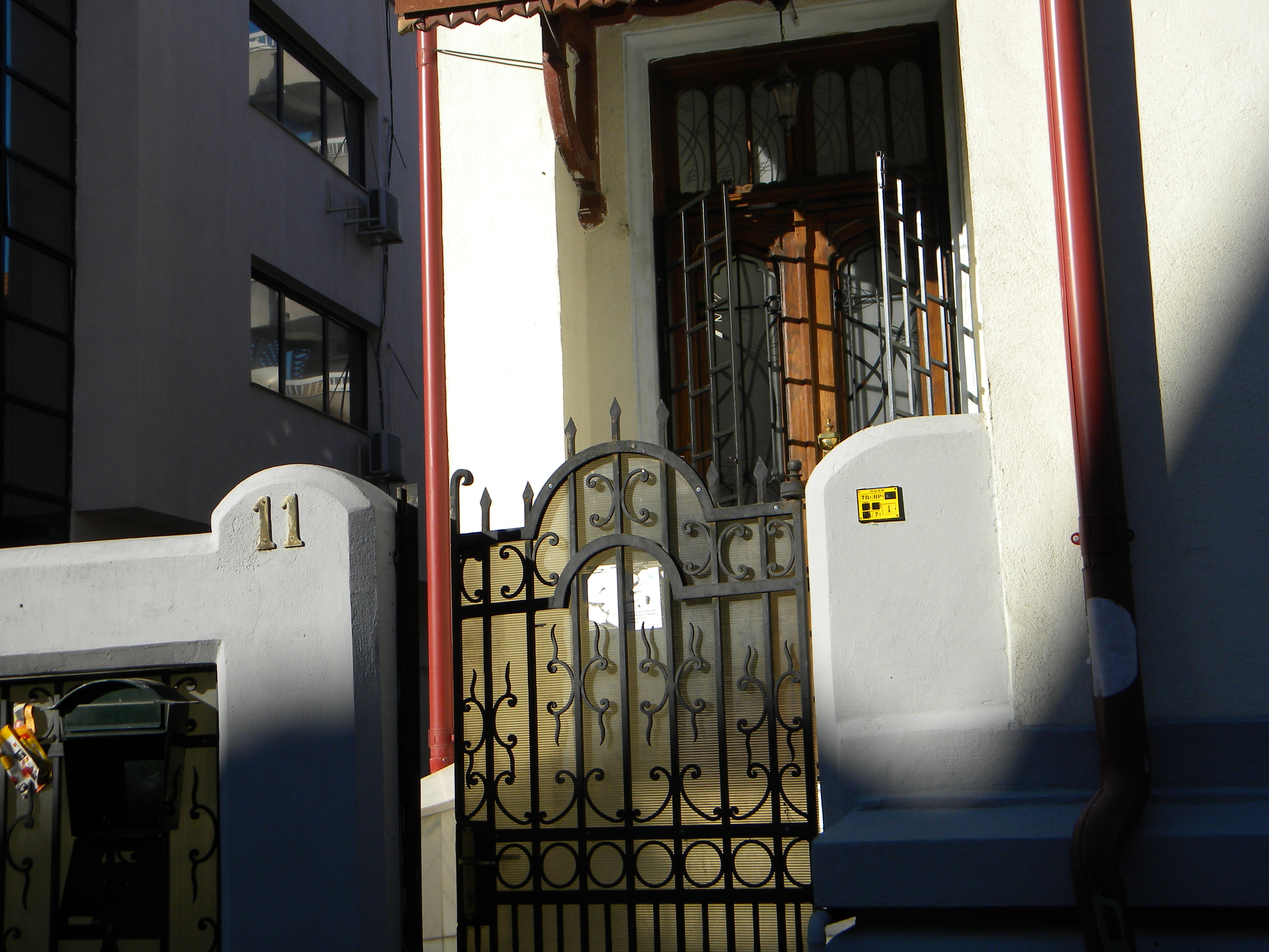 Bucuresti, Romania, Str. Alexandru Philippide nr. 11, sect. 2 (Cod B-II-m-B-19381) (2 prim)